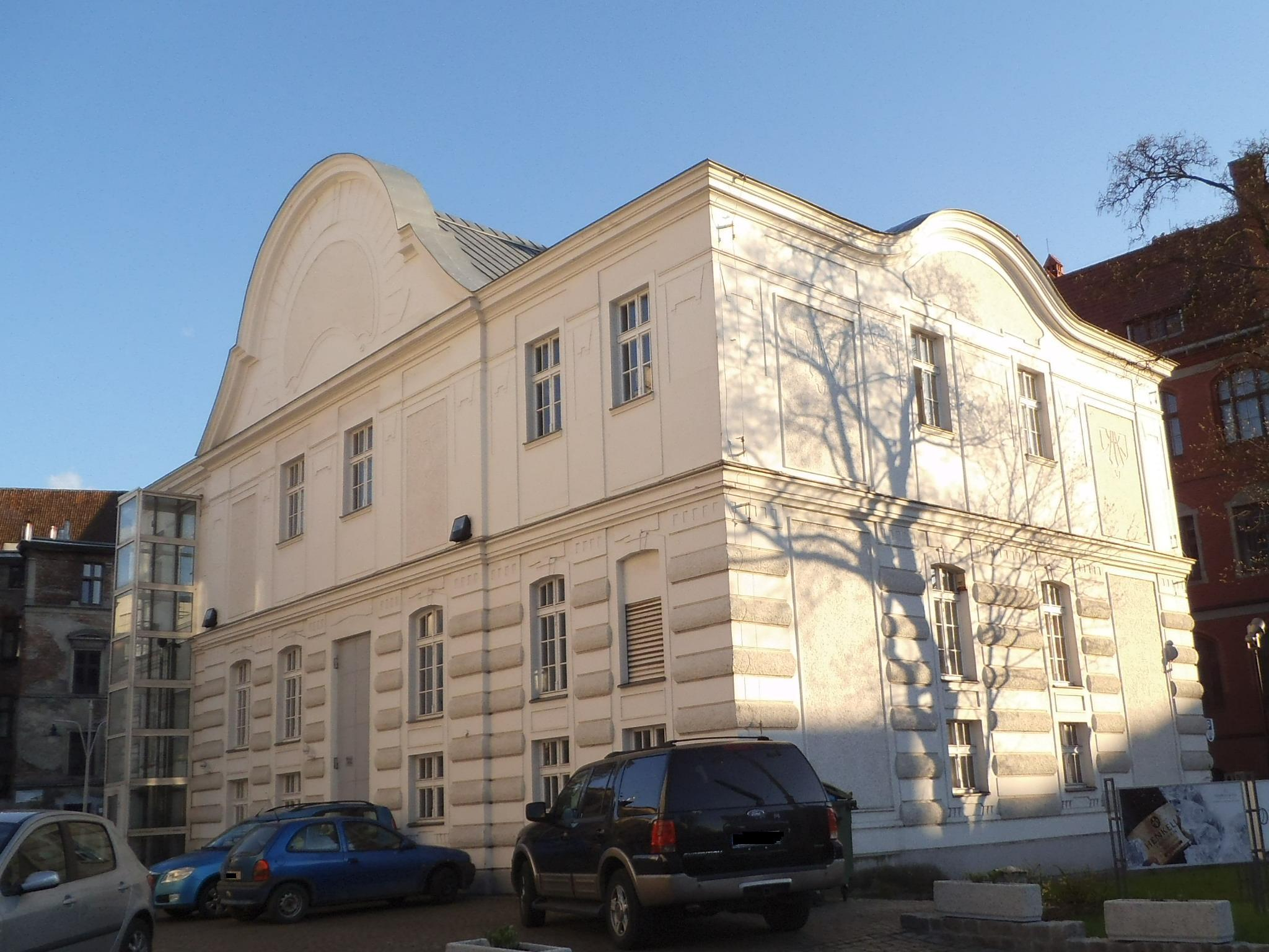 Scena na Zapleczu w Toruniu